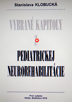 Detail stránky z knihy Vybrané kapitoly z pediatrickej neurorehabilitácie. Autorka: MUDr.S. Klobucká, PhD. Vydavateľstvo Herba, 2018 Bratislava. Slovensko.